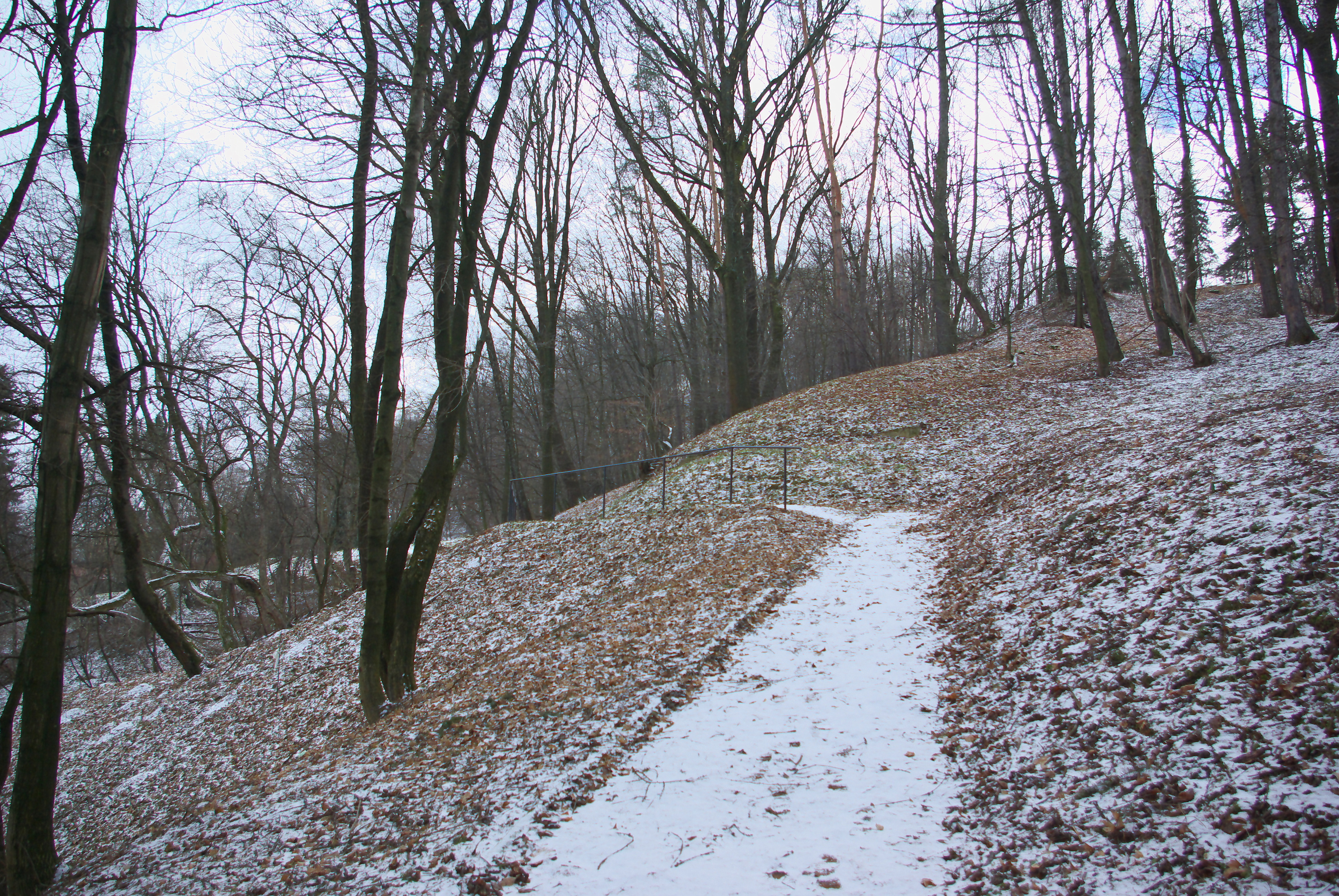 Północny stok na Górze Parkowej w Sanoku na terenie parku miejskiego im. Adama Mickiewicza - miejsce, w którym istniała skocznia narciarska.